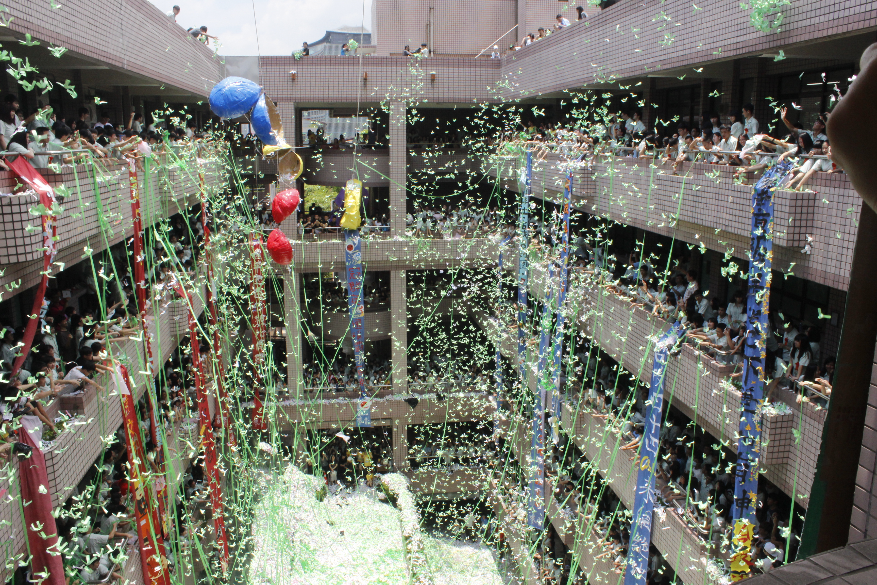 2015年臺北市立松山高級中學柳絮紛飛。